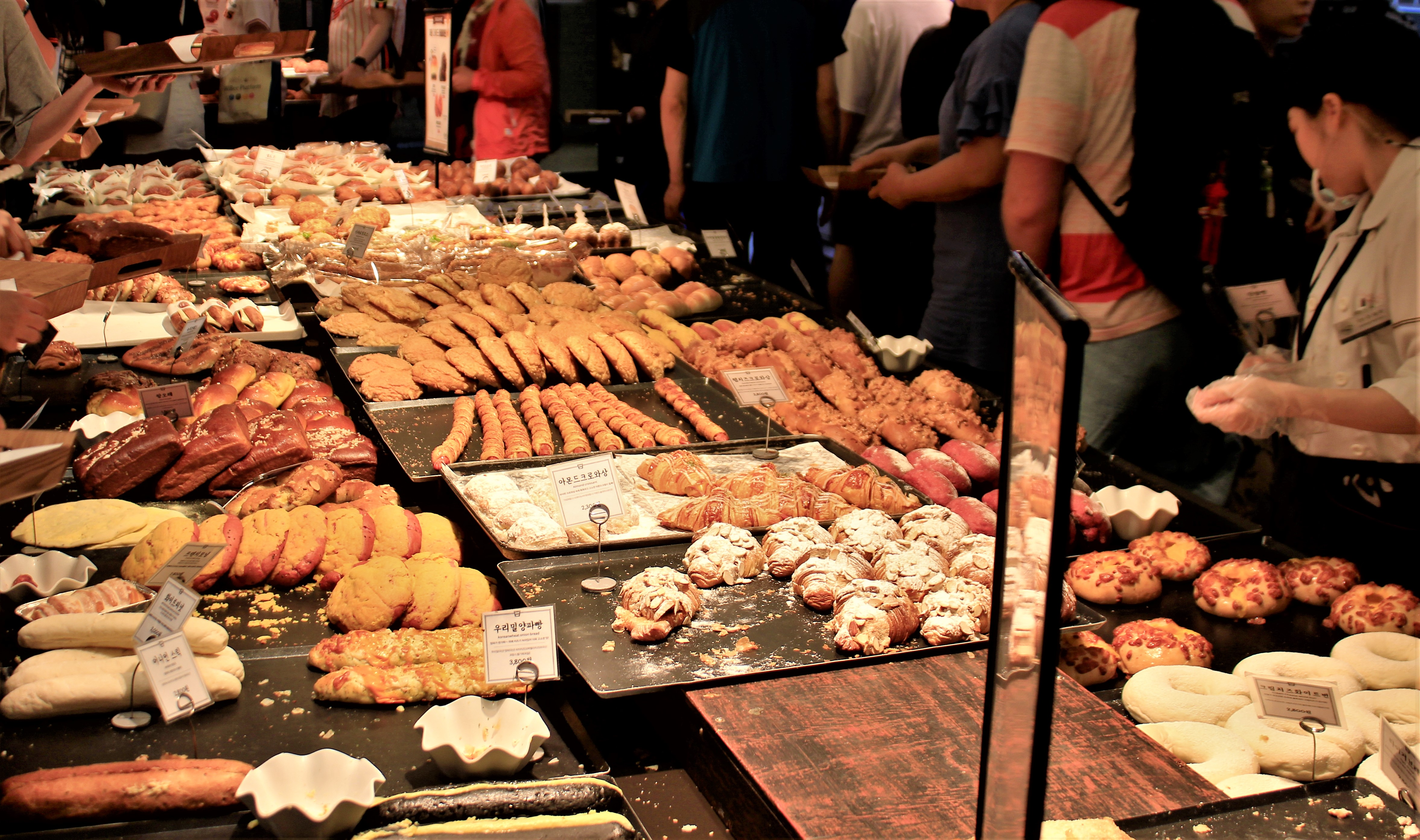 대한민국 대전광역시의 빵집 성심당의 빵 진열대